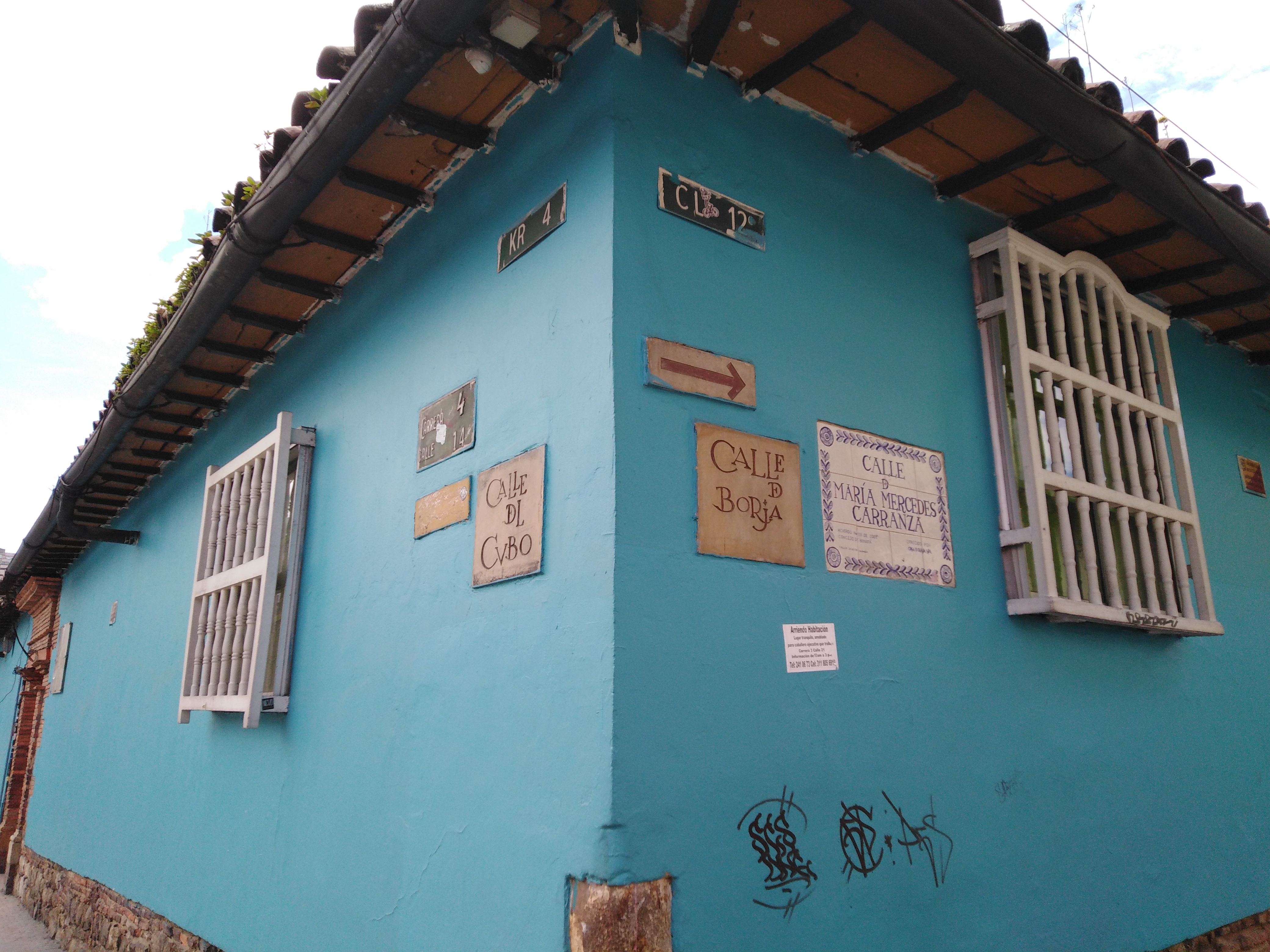 Croisement de la calle 12 et de la carrera 4, Bogotá